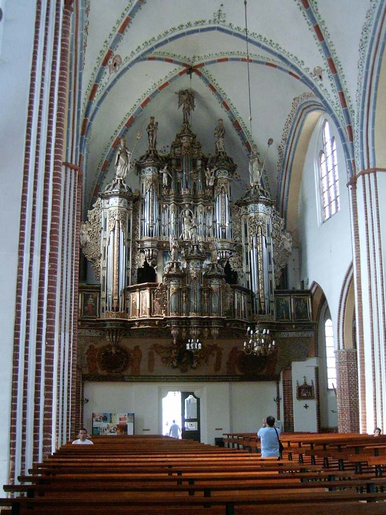 Kamień Pomorski - Katedra